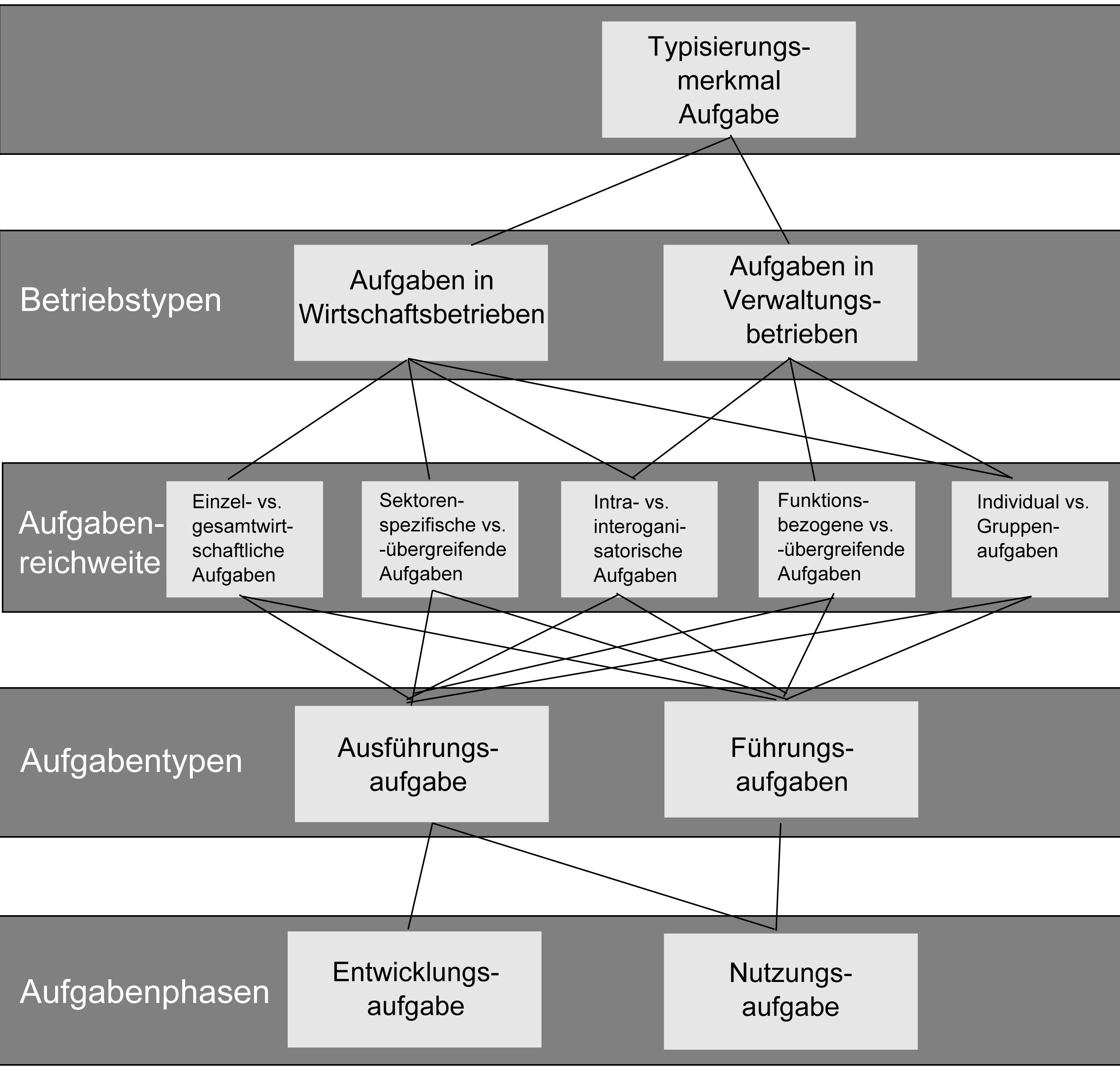 Angelehnt an Heinrich et al.; Wirtschaftsinformatik; 4. Auflage